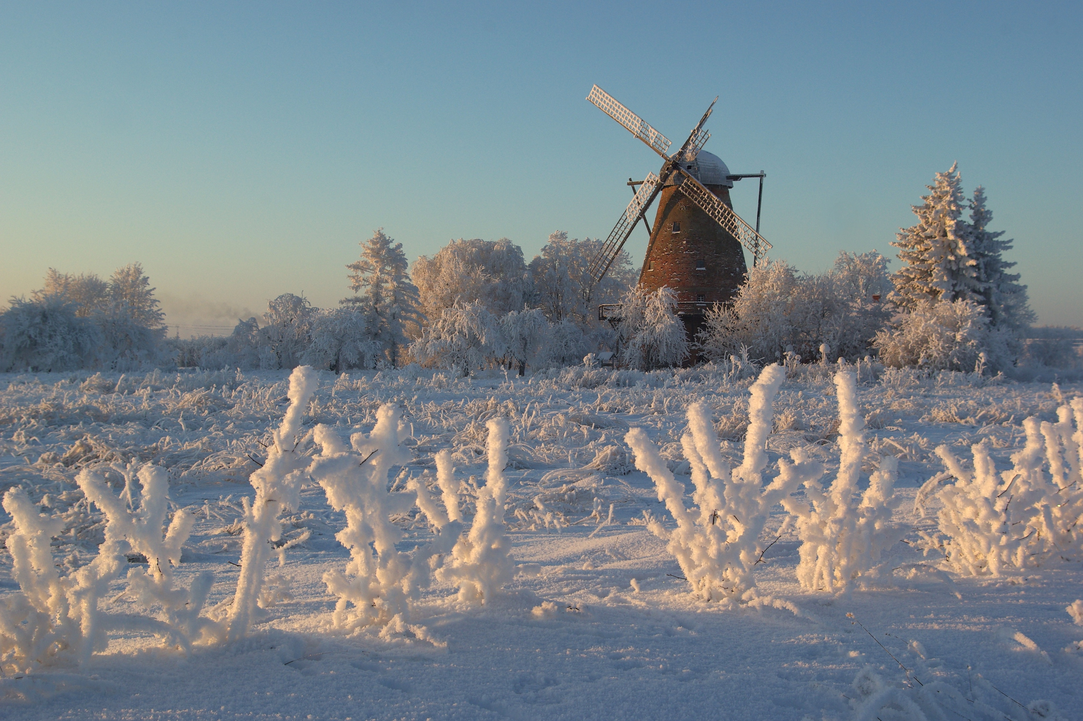 Pēterlauku vējdzirnavas, Pēterlauki